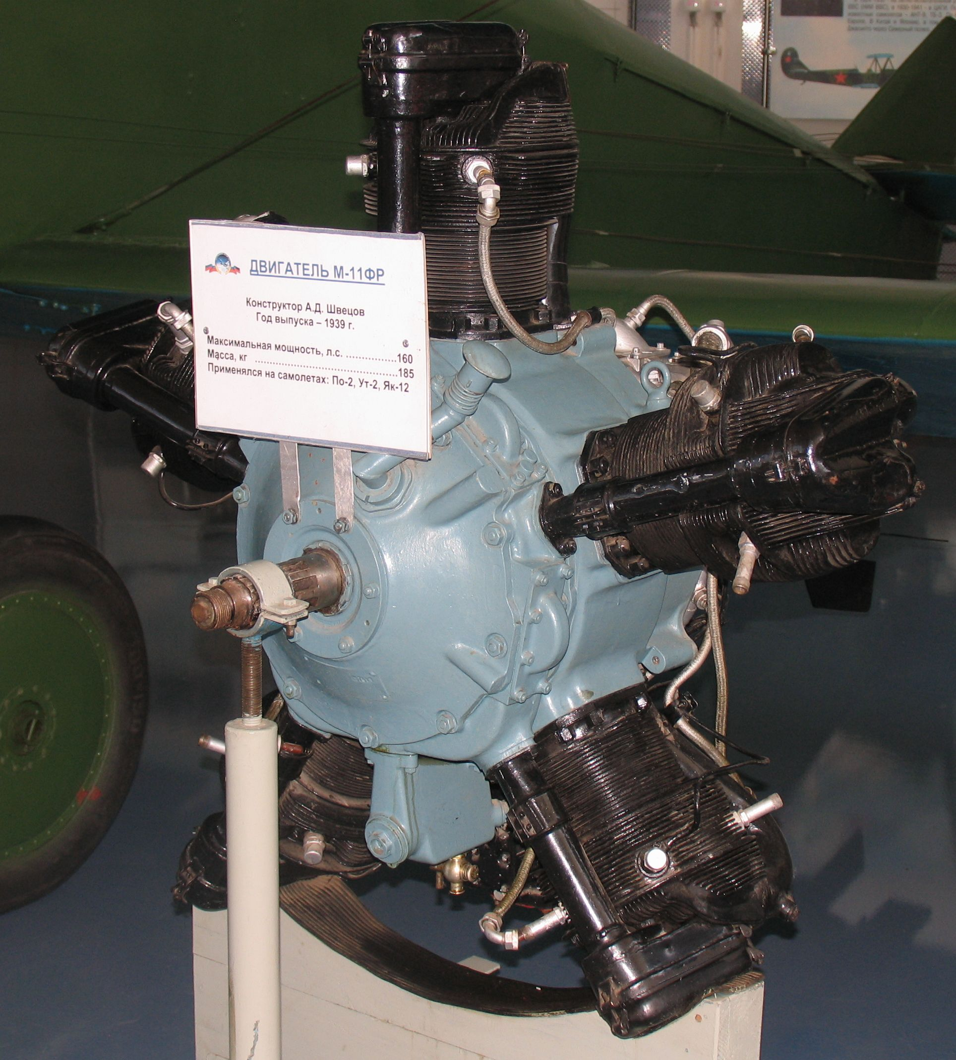 Двигатель М-11ФР. Музей ВВС.